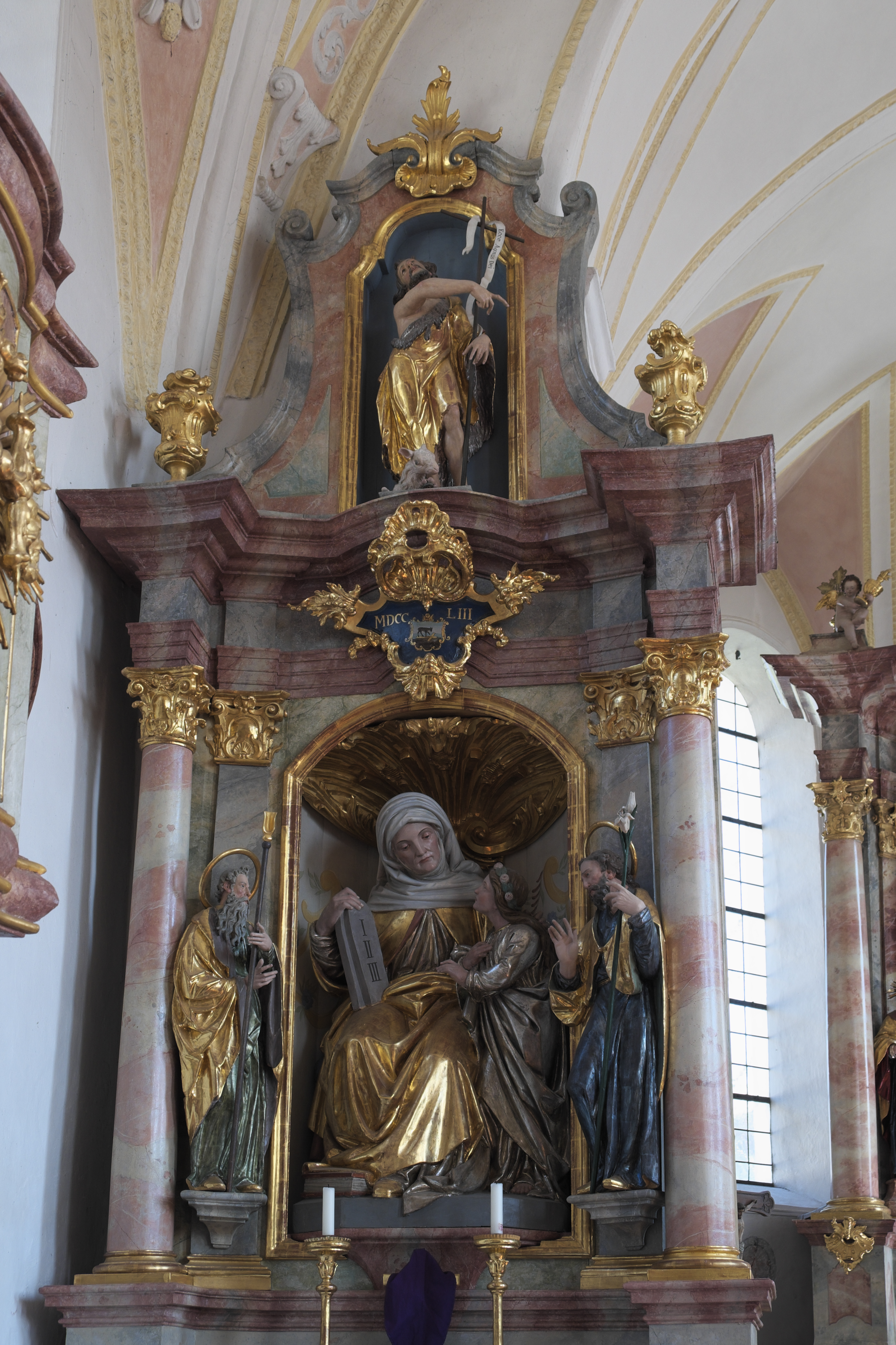 Katholische Pfarrkirche St. Michael in Etting (Polling) im Landkreis Weilheim-Schongau (Bayern/Deutschland), Seitenaltar